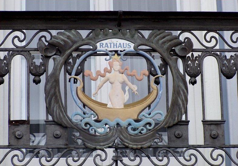 Wappen von Lambach auf dem Balkon des Lambacher Rathauses (Wappenfigur: die legendäre Jungfrau Flavia)